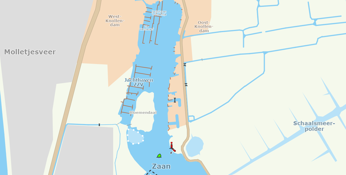 Eiland Bloemendaal op een waterkaart afgebeeld